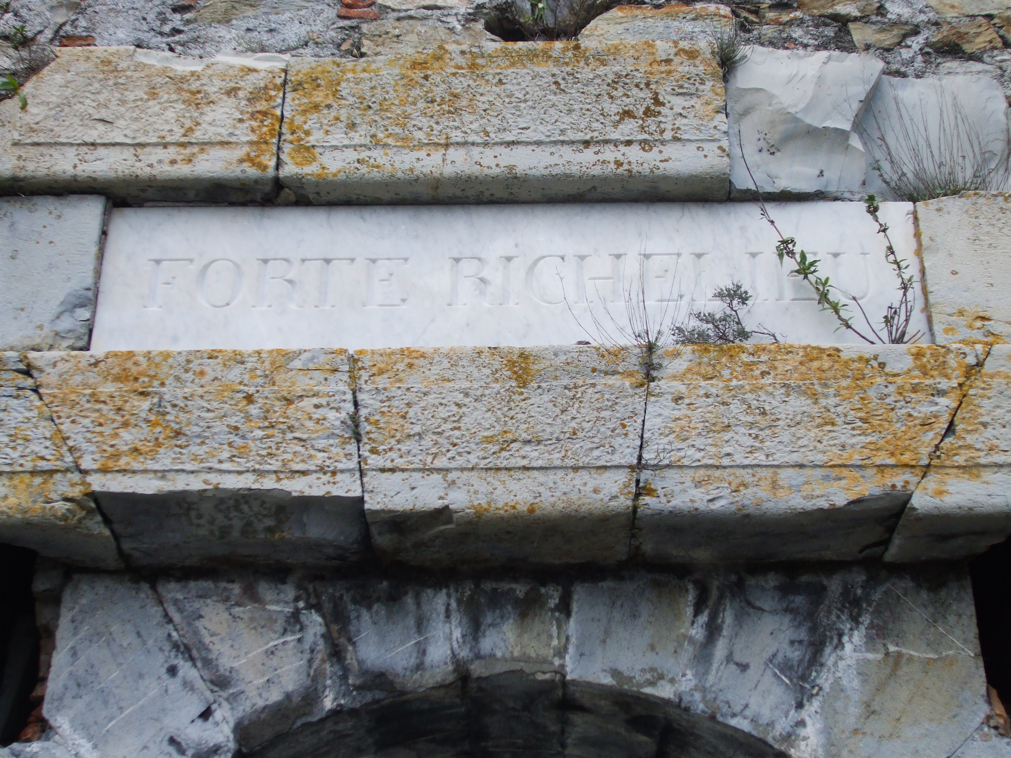 Foto della targa all'ingresso del Forte Richelieu - Genova